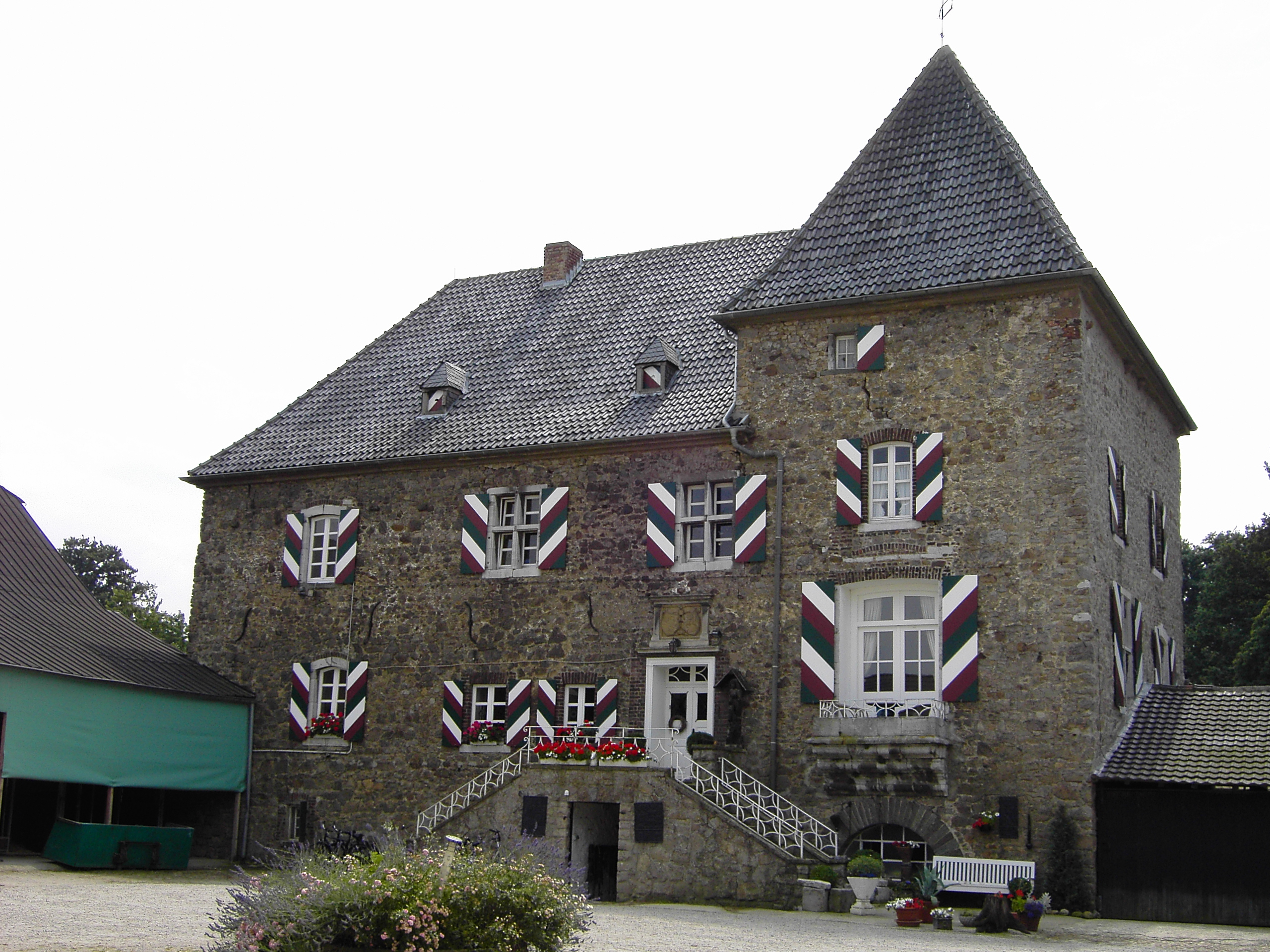 Burg Holzheim bei Heistern (Herrenhaus)